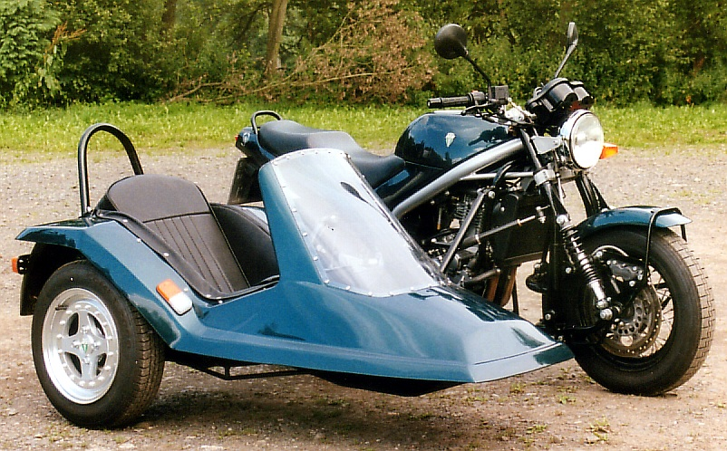 MZ Scorpion, Walter Gespann Umbau mit einer Schwingengabel usw.